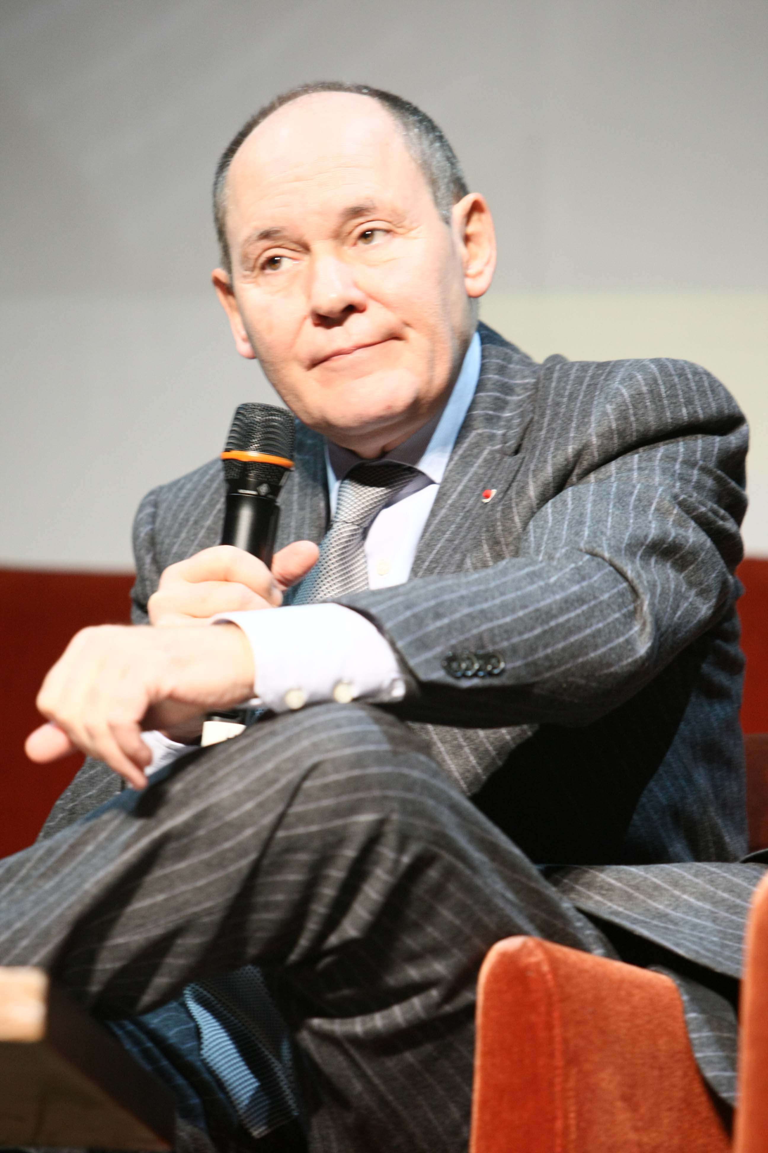 René Ricol, économiste français